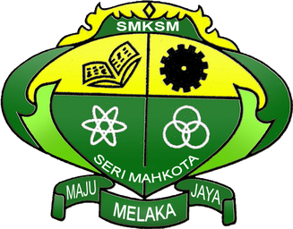 Lencana sekolah SMKSM